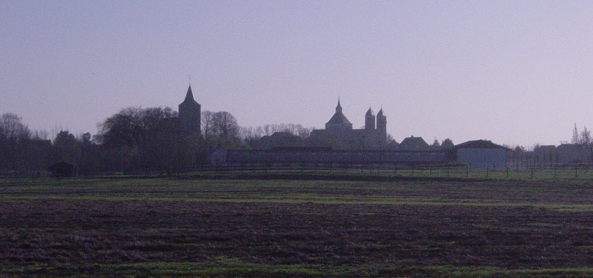 Blik op Halsteren